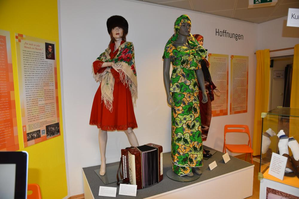 Die aktuelle Ausstellung "Neue Horizonte. Dürener Migrantinnen erzählen"